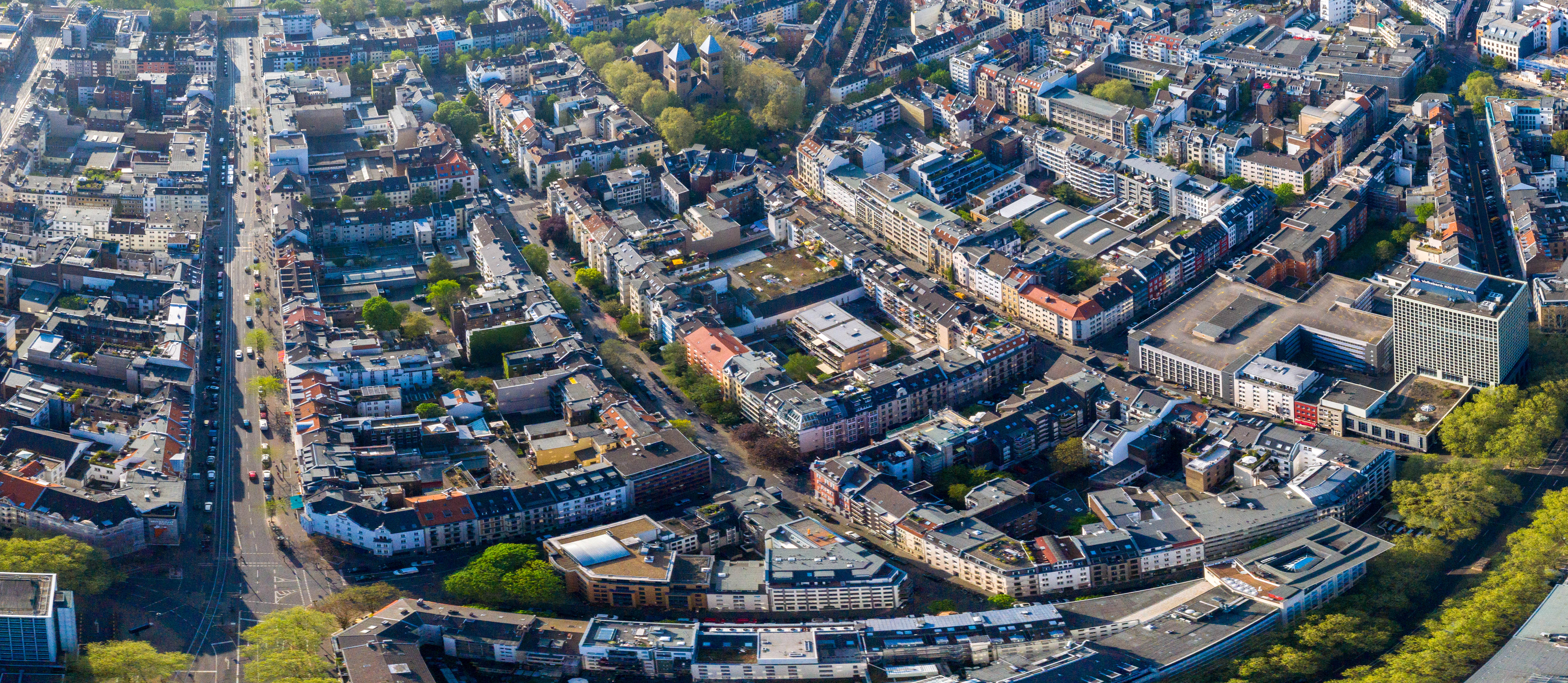 Das Belgische Viertel liegt westlich vom Zentrum der Stadt Köln. Die Drohnenkamera blickt hier vom Rudolfplatz aus nach Nordwesten.